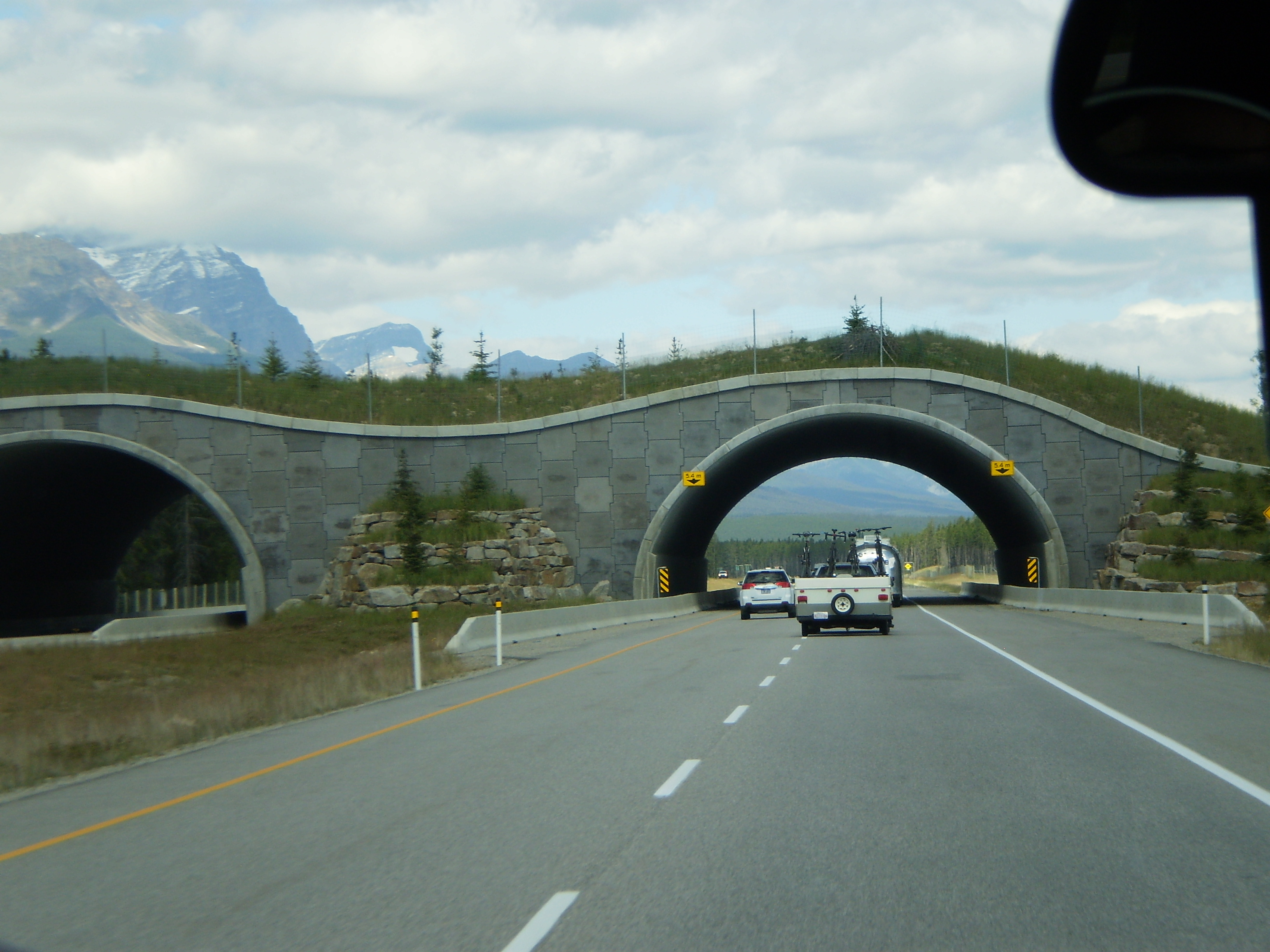 Srpski (latinica): Nacioanlni park Banf, Kanada. Most za životinje. Gradnjom ovih mostova smanjuje se broj saobracajnih udesa i smrtnih slučajeva među raznim životinjskim vrstama uzrokovanih točkovima automobila, i pomaže u očuvanju migracionih trasa mnogih vrsta.